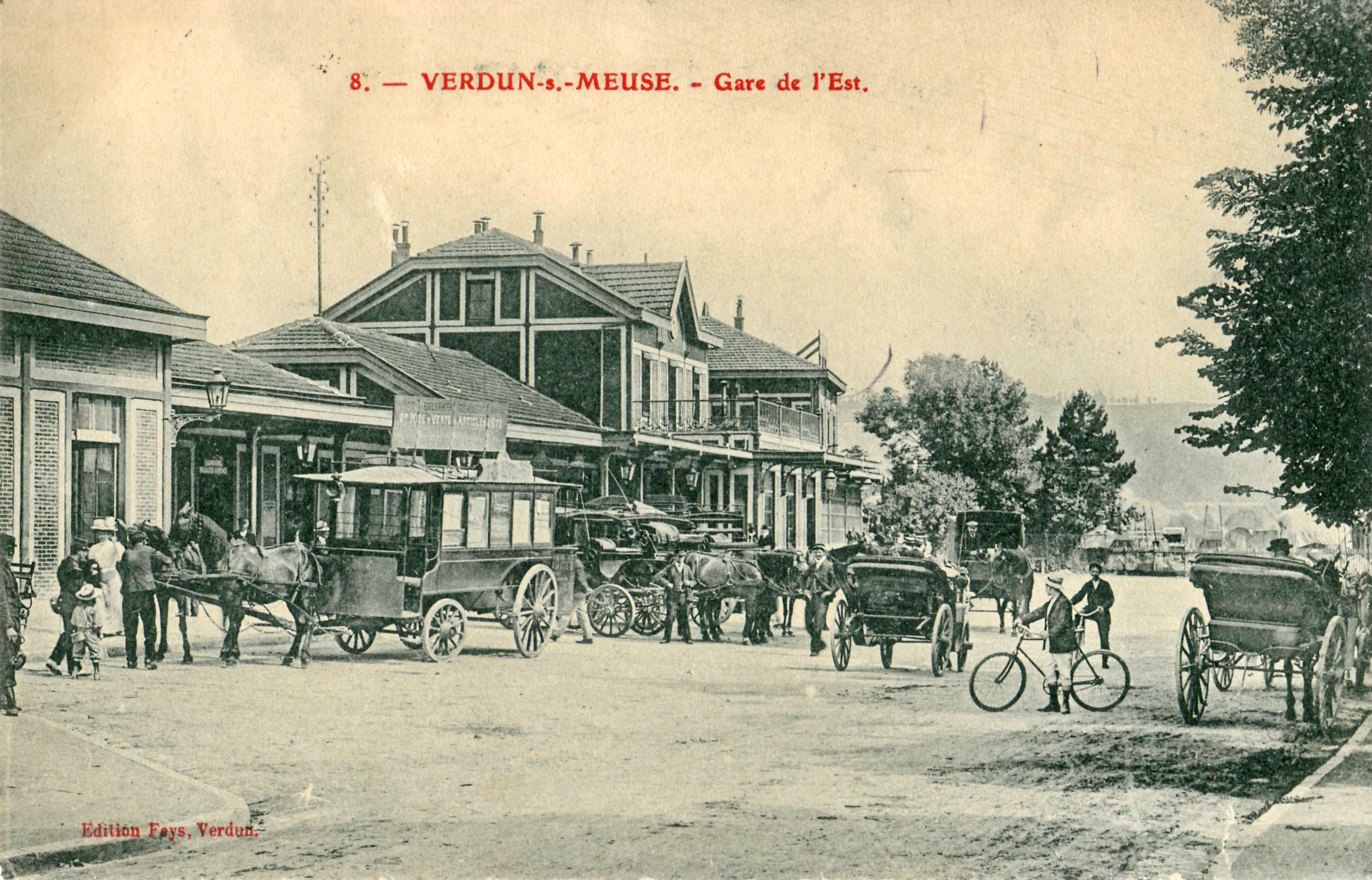 Carte postale ancienne éditée par la librairie Fays à Verdun, n°8 : VERDUN-sur-MEUSE - Gare de l'Est